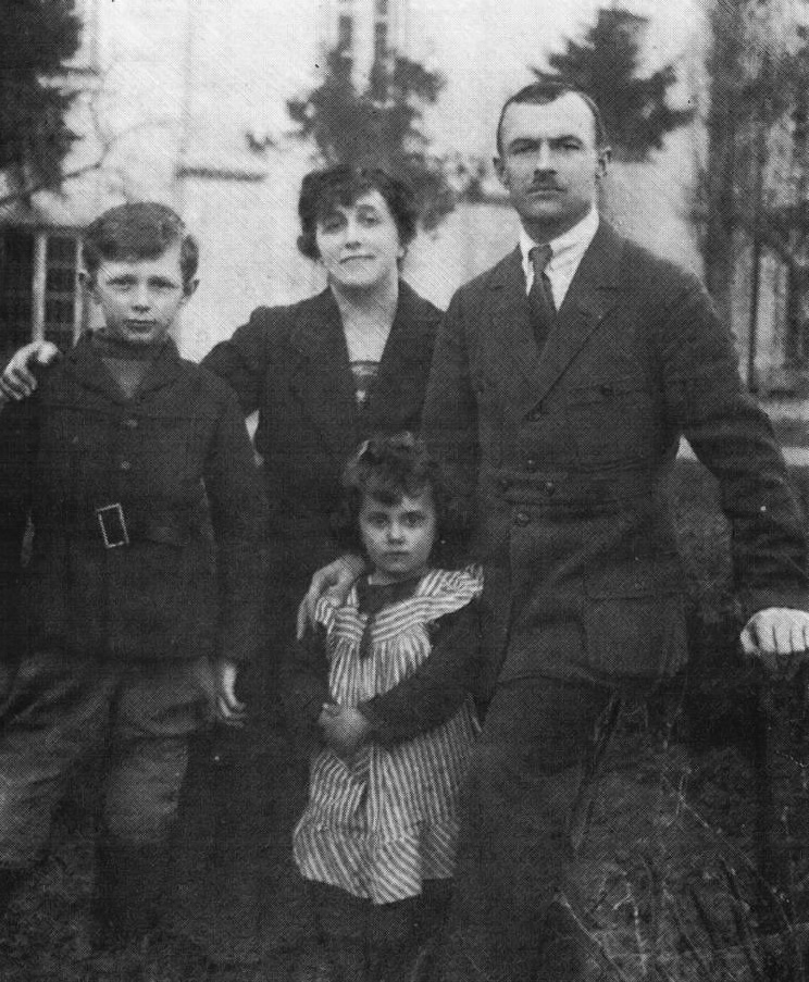 Сымон Рак-Міхайлоўскі з жонкай Надзеяй, дачкой Рагнедай і сынам Рагвалодам. У двары Віленскай беларускай гімназіі, 1923 г.